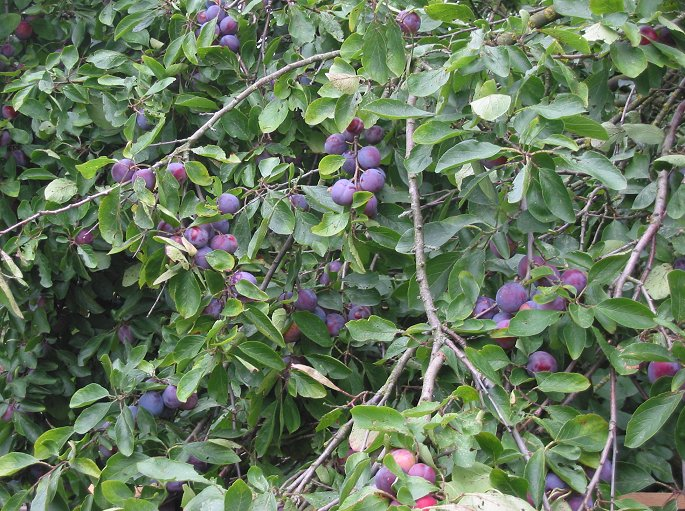 zelfgemaakte foto van pruim ras Opal; eind juli